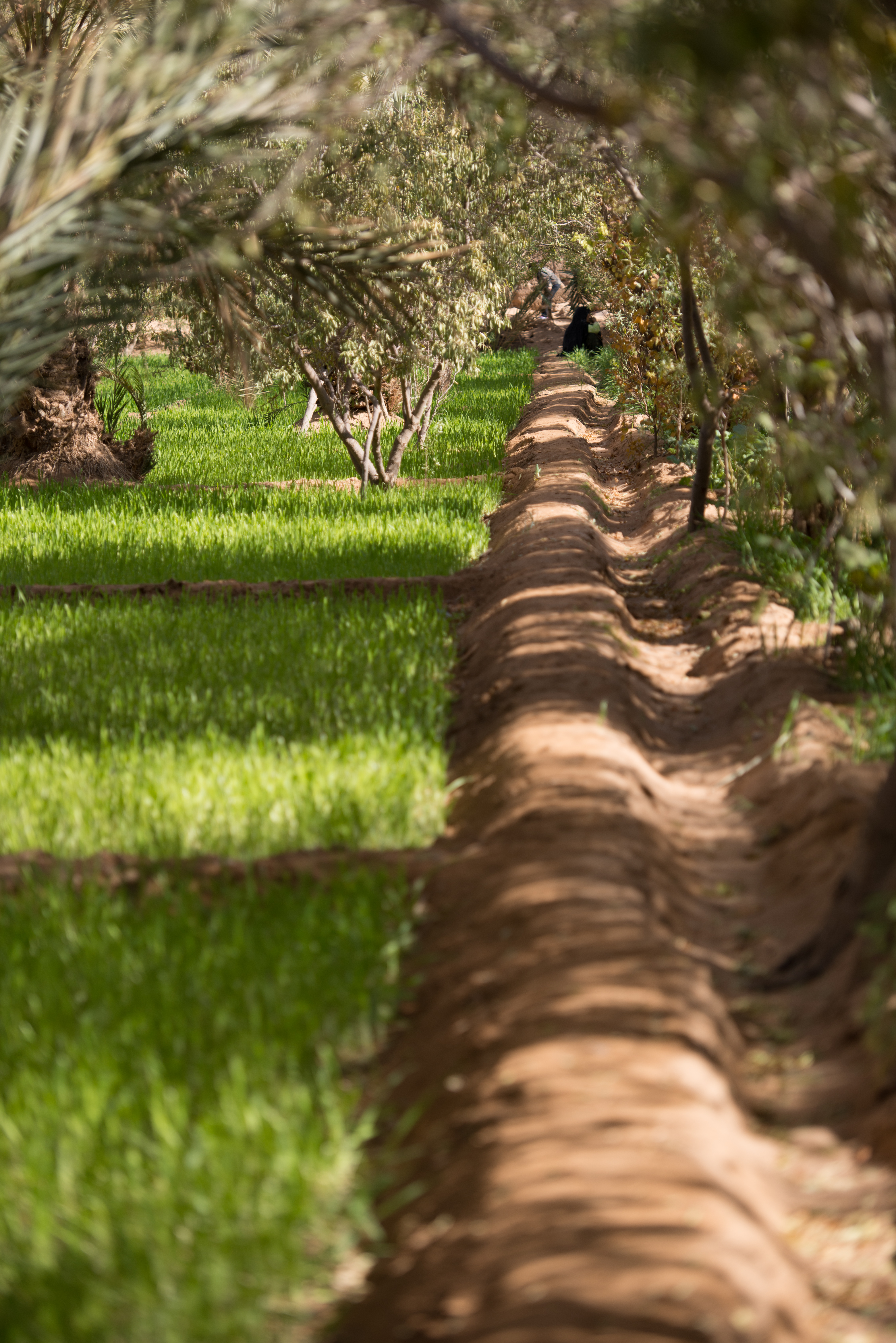 Inside the oasis Igrane, Hassilabied, Morocco.